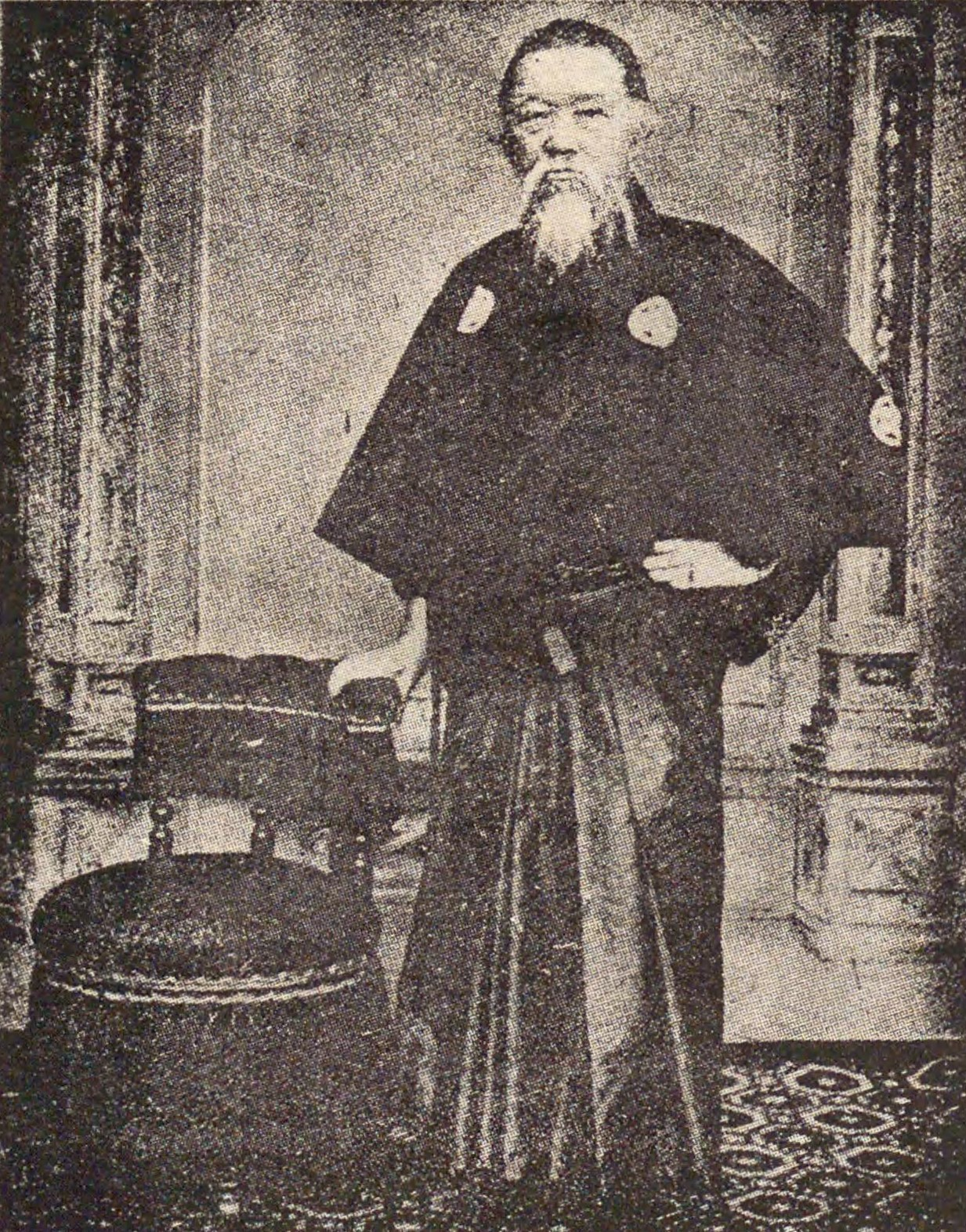 明治天皇に直訴した当時（1901年）の田中正造。